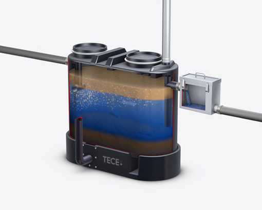 Schnitt durch einen Fettabscheider "Komplettentsorger" System Tece Basika